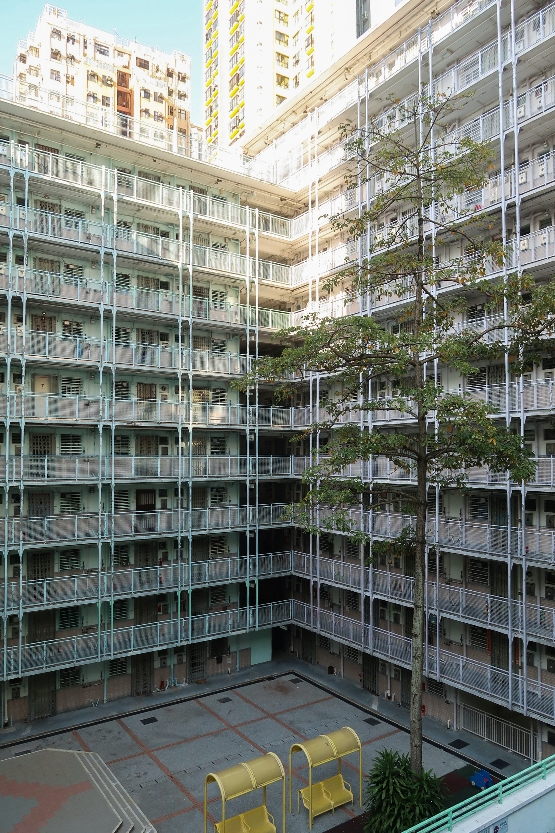 Sai Wan Estate